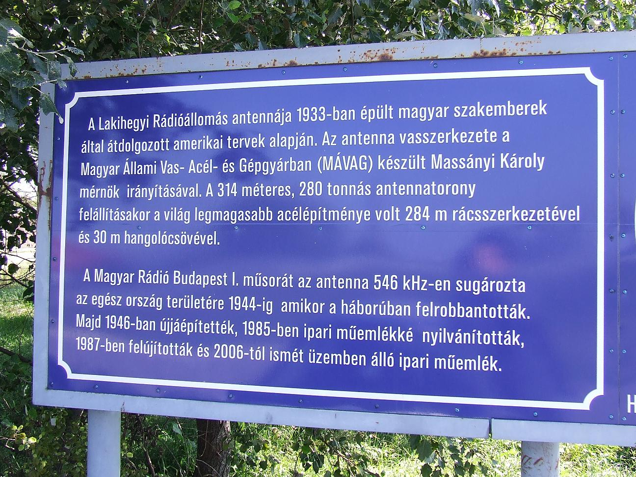 Információs tábla a lakihegyi adótoronyhoz vezető bekötőút elején, 2007. szeptember 22-én.